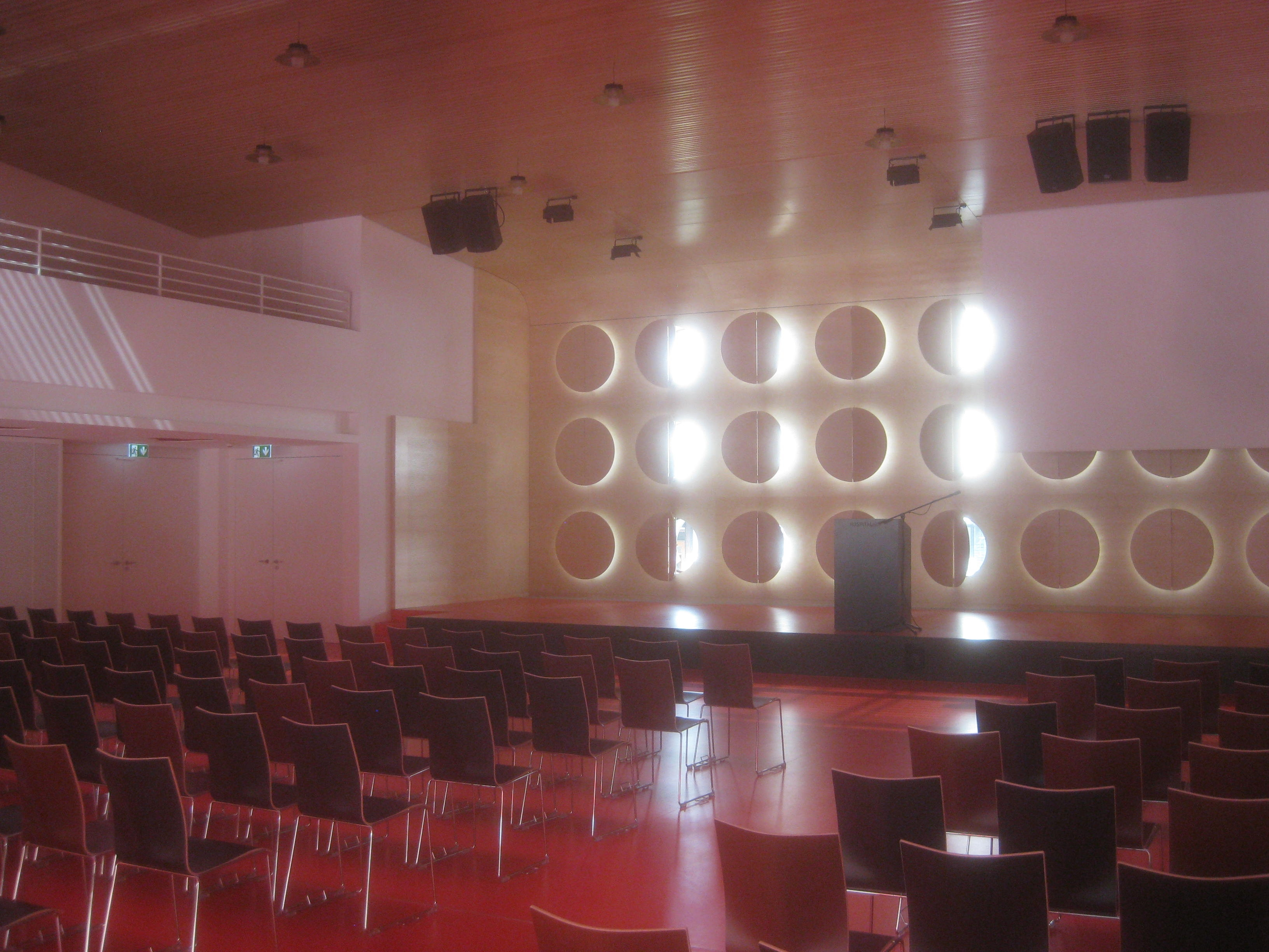 Hospitalhof in Stuttgart, Großer Saal, Blick auf die Bühne.